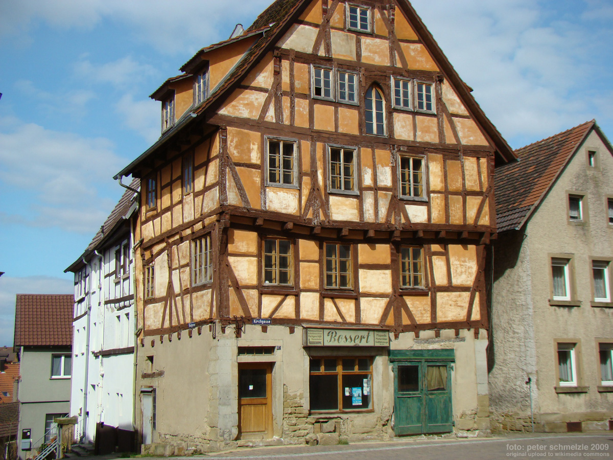 Historisches Gebäude Kirchgasse 13 in Eppingen